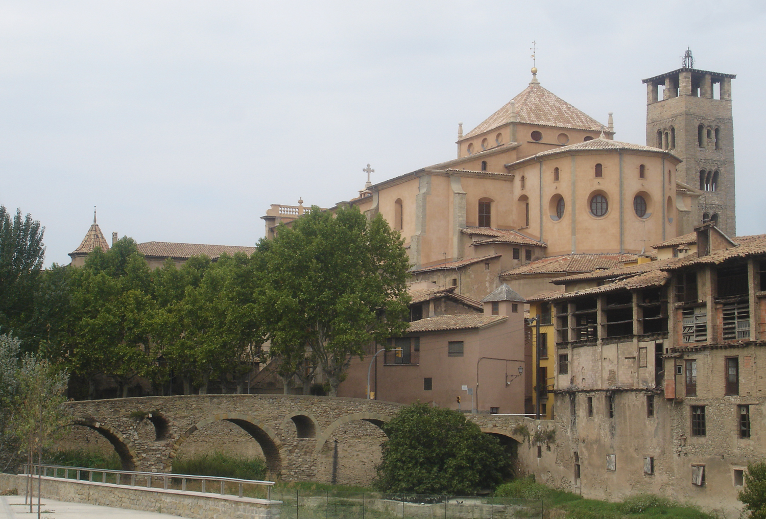 Catedral de Sant Pere de Vic (Vic, Osona, Catalunya, Espanya)